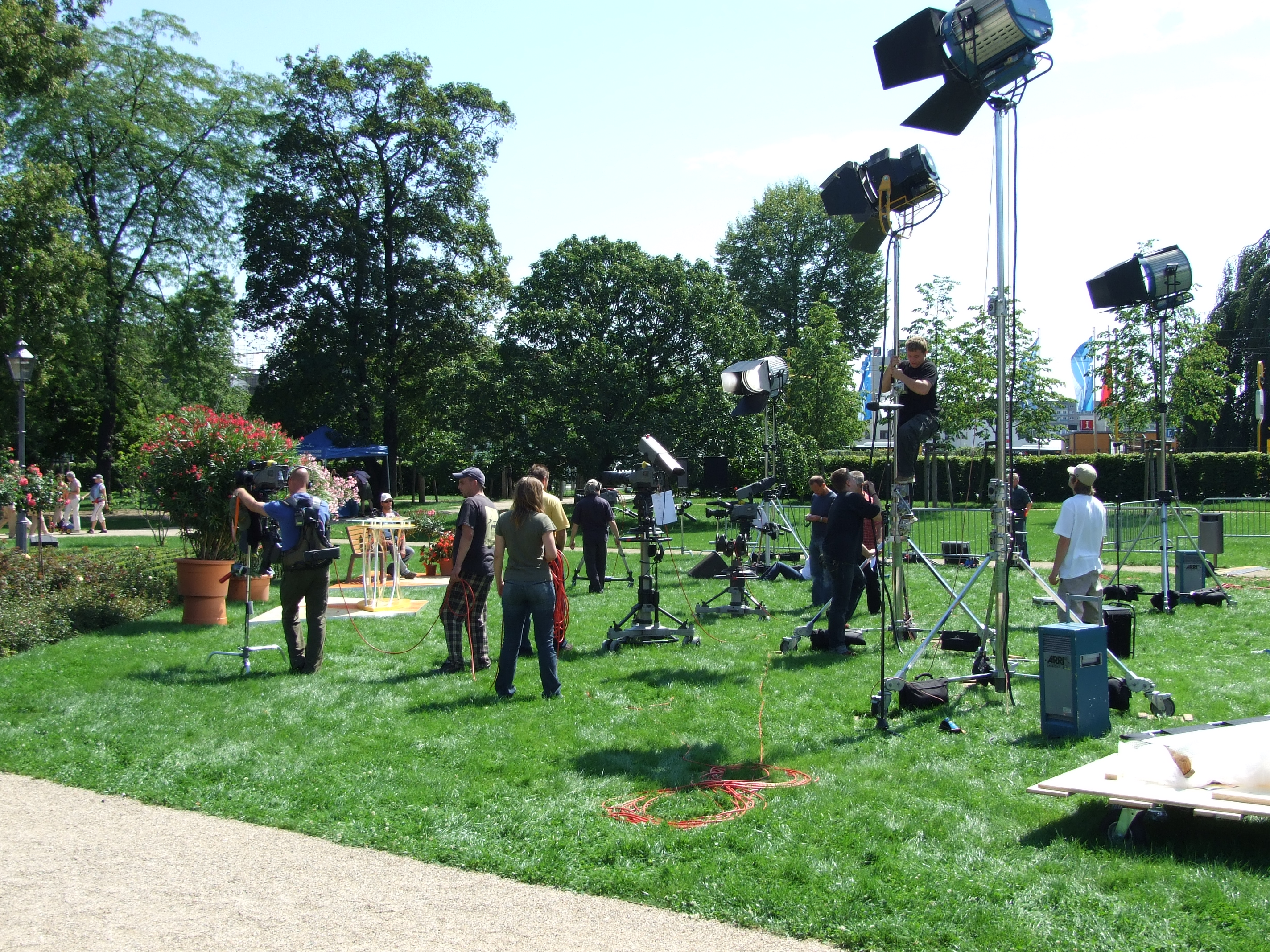 Fernsehset des MDR in der Nähe des BUGA-Geländes in Gera